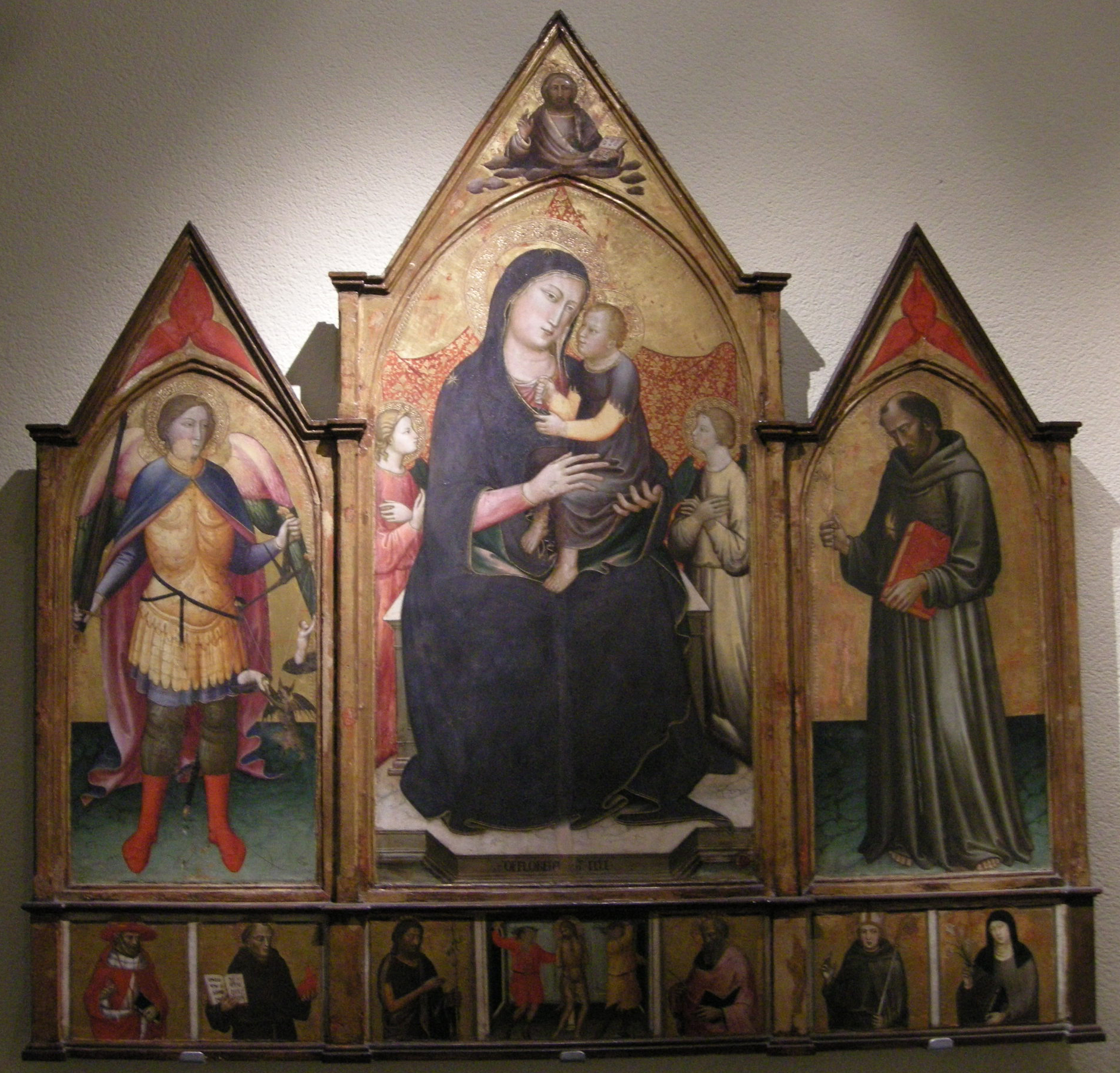 madonna tra i santi michele e francesco